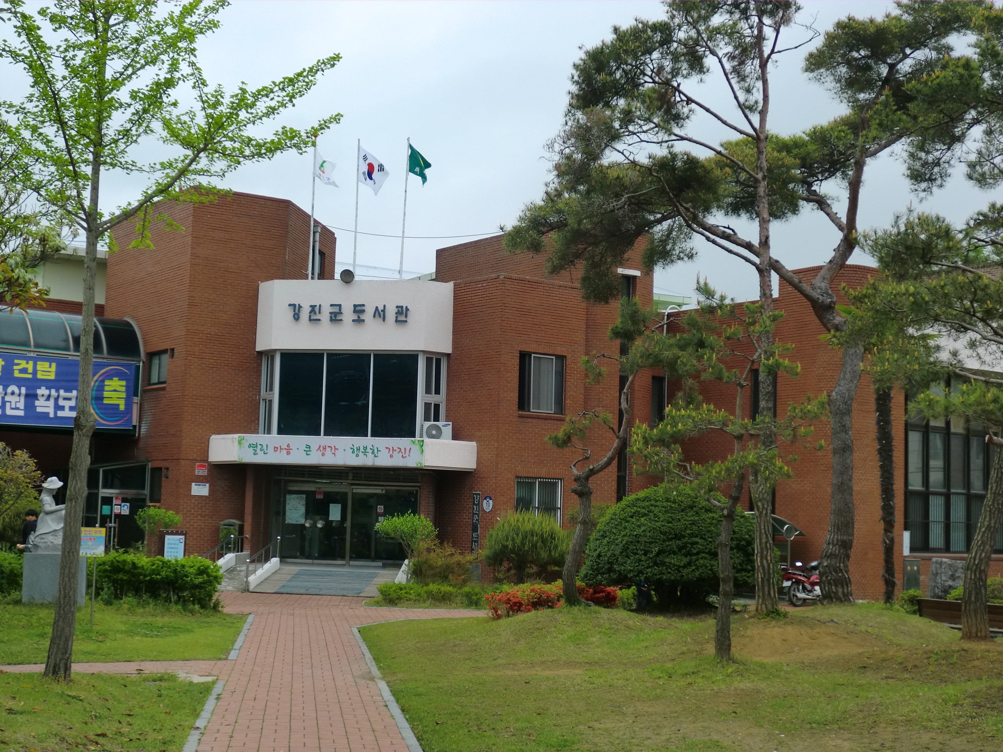 전라남도 강진군에 있는 강진군립도서관